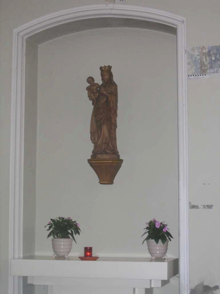 altar of mary in St. Knud, Friedrichstadt, Germany